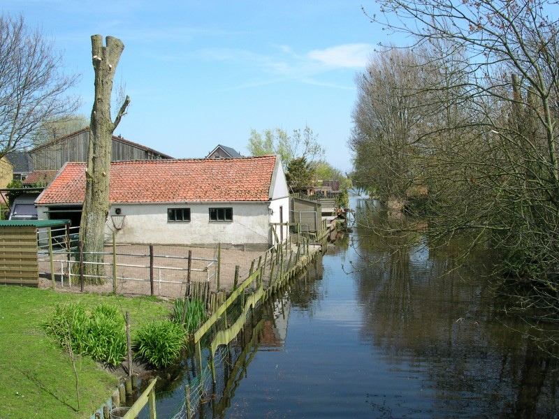 Sloot in de buurtschap Bangert in Andijk. Ditch in the hamlet Bangert in Andijk.